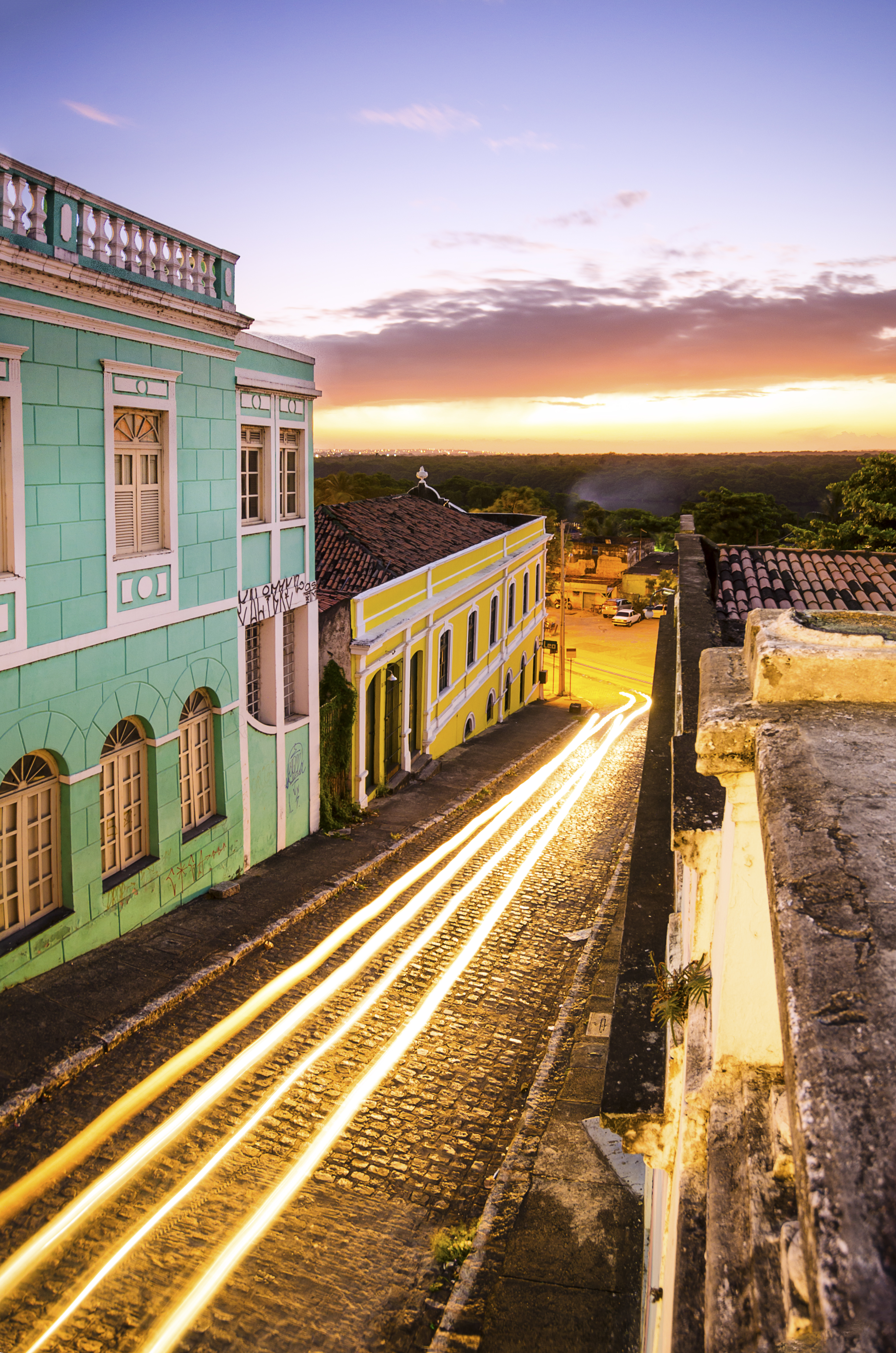 Centro Histórico de João Pessoa